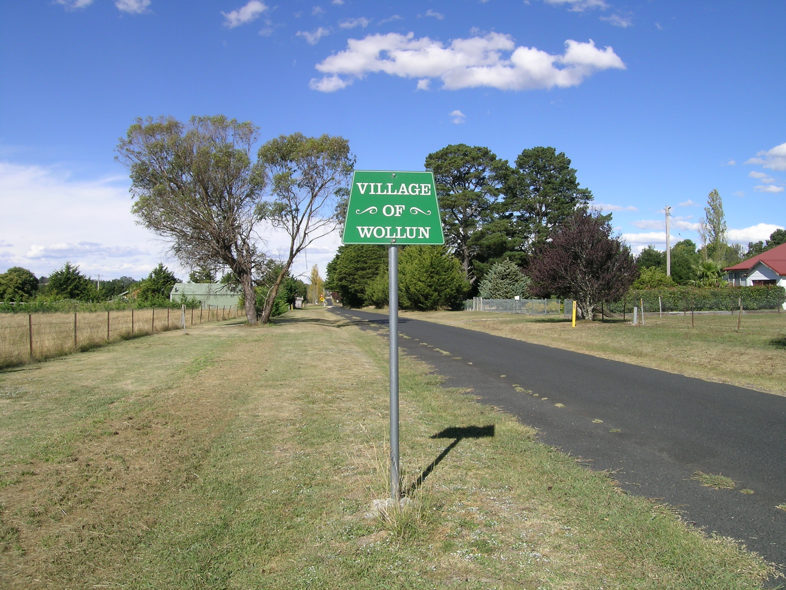 Wollun, NSW